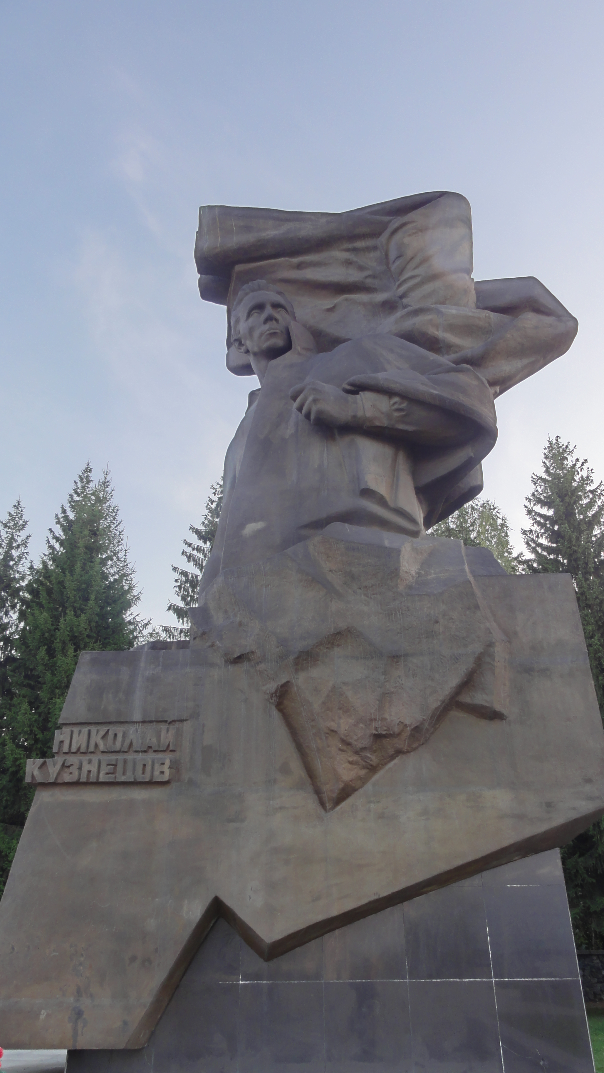 Памятник Герою Советского Союза Кузнецову Н.И.: площадь 50-летия Уралмашзавода, Екатеринбург, Свердловская область